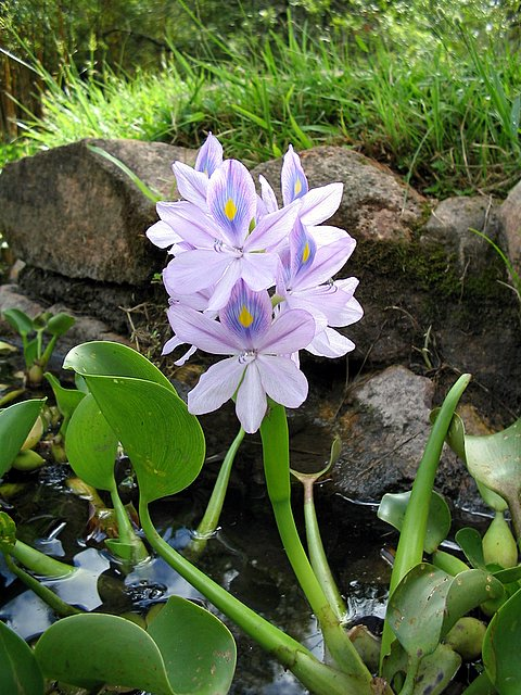 Eichhornia crassipes